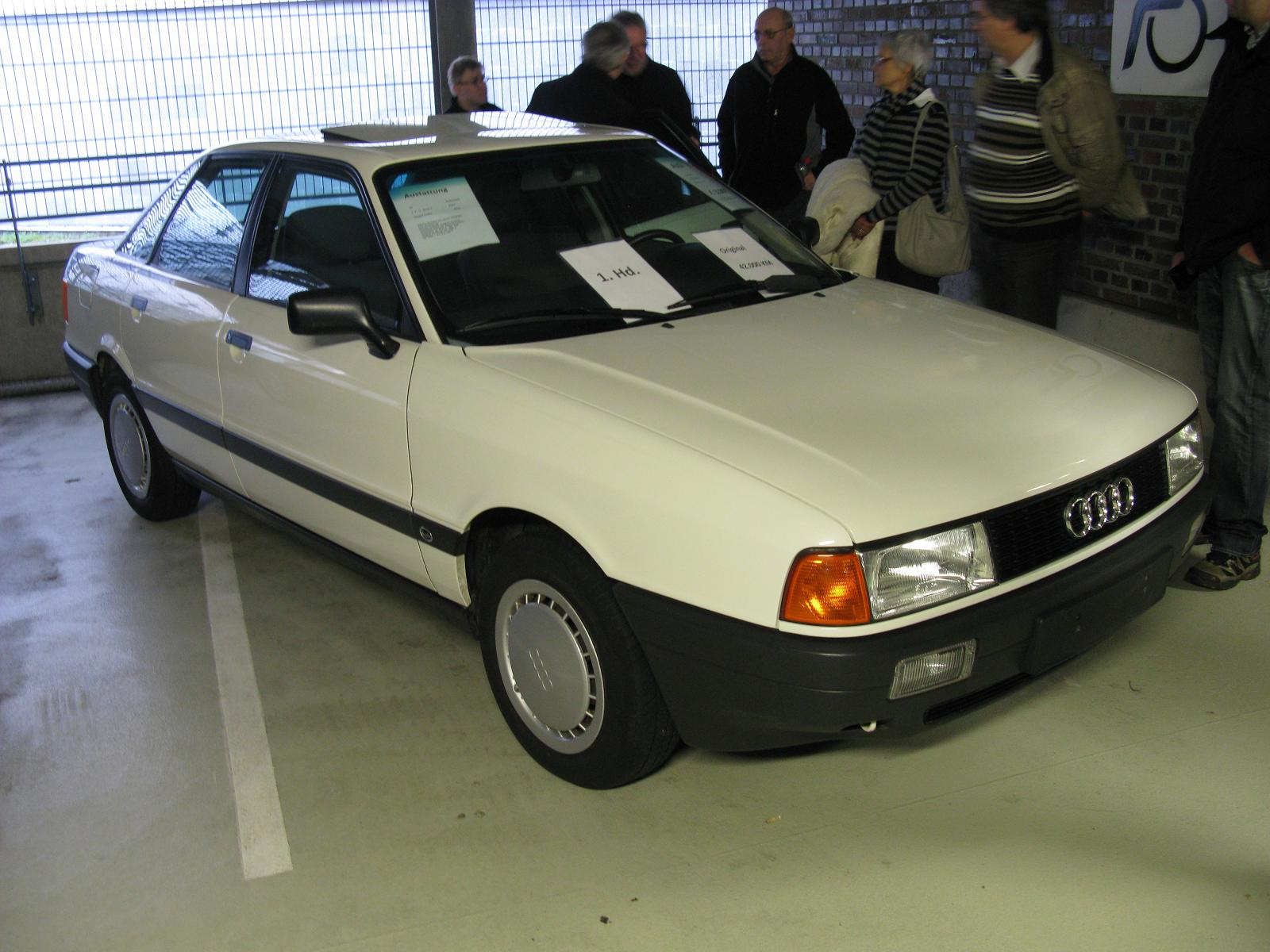 Audi 80 1.8S